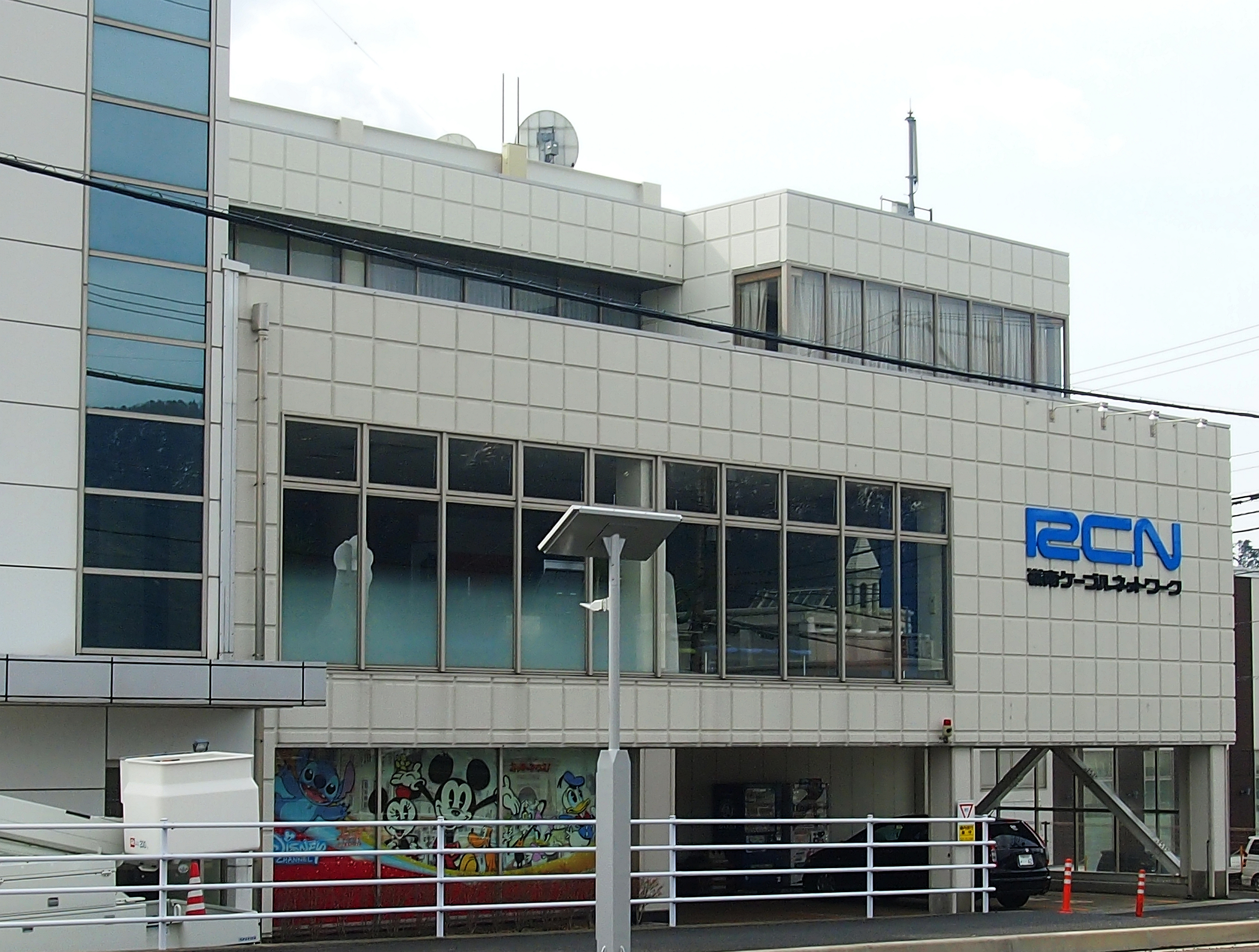 福井県敦賀市のケーブルテレビ局、略称はRCN